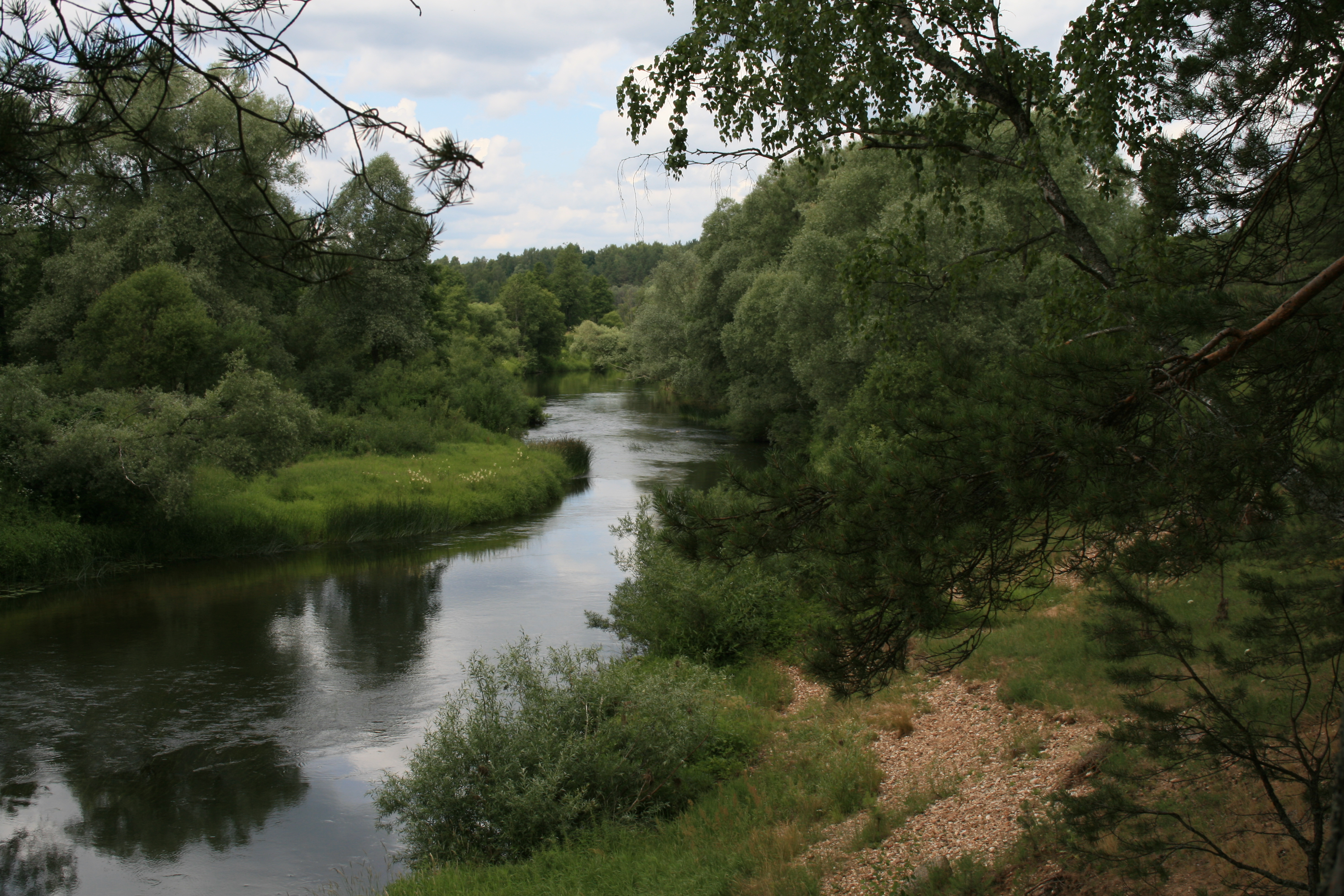 Пейзаж. Калужская область